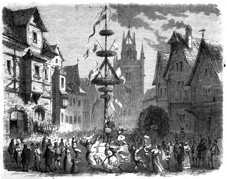 Maitag in England